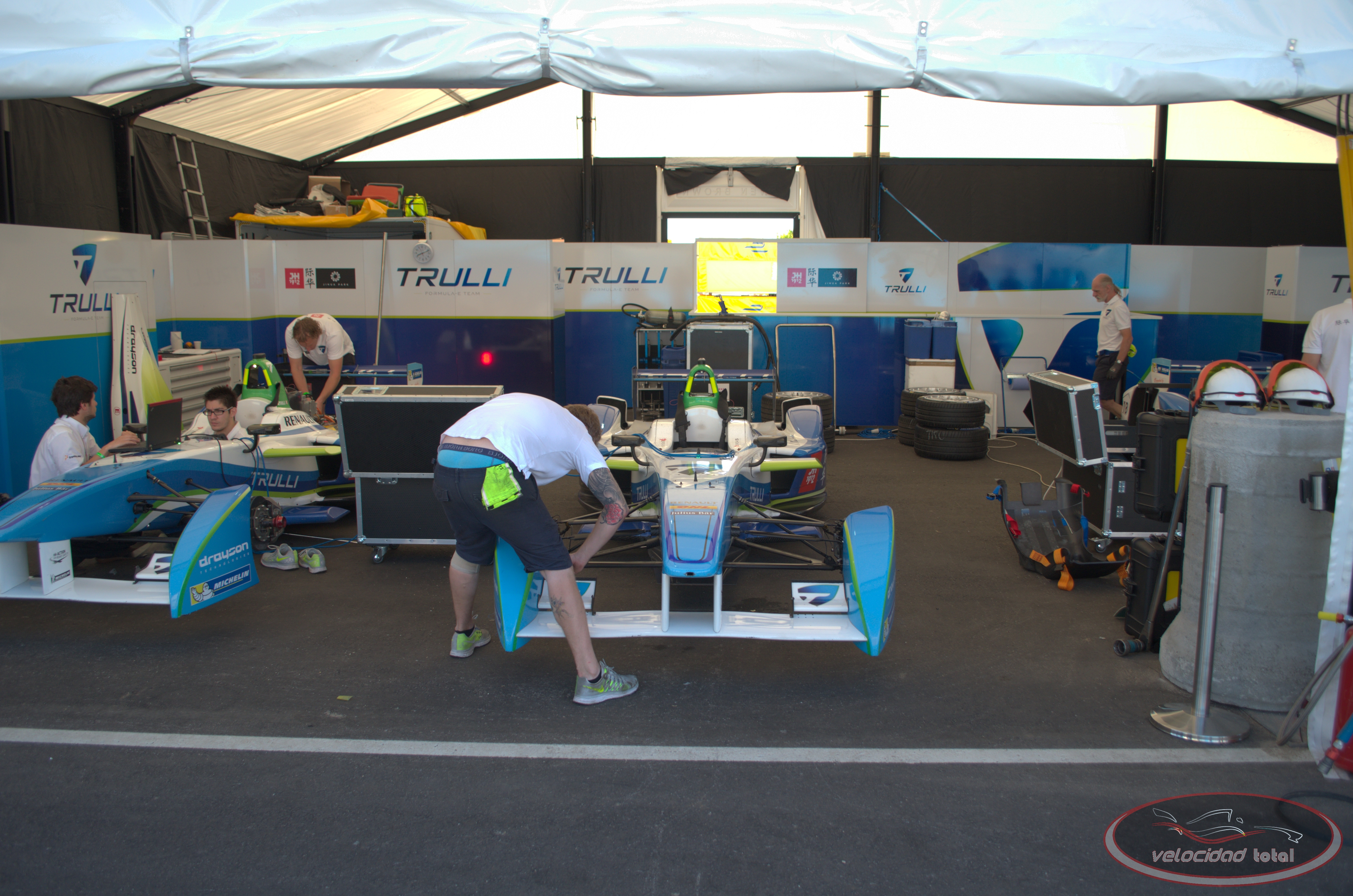 Solo se permite el uso de esta imagen mencionando a Velocidad Total como su autor. Imagen del equipo Trulli de Fórmula E, durante el Punta del Este ePrix de 2014.